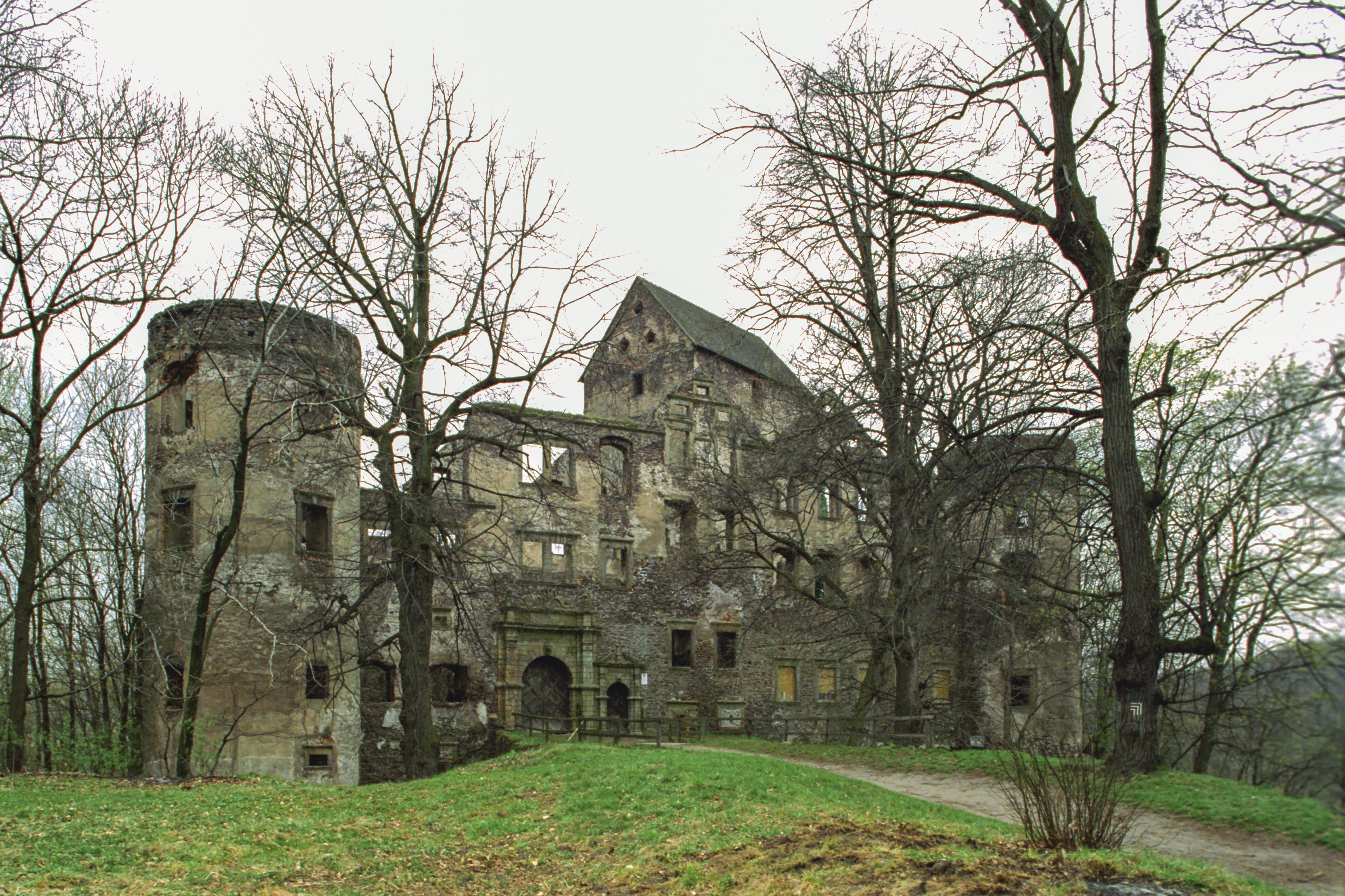 Świny